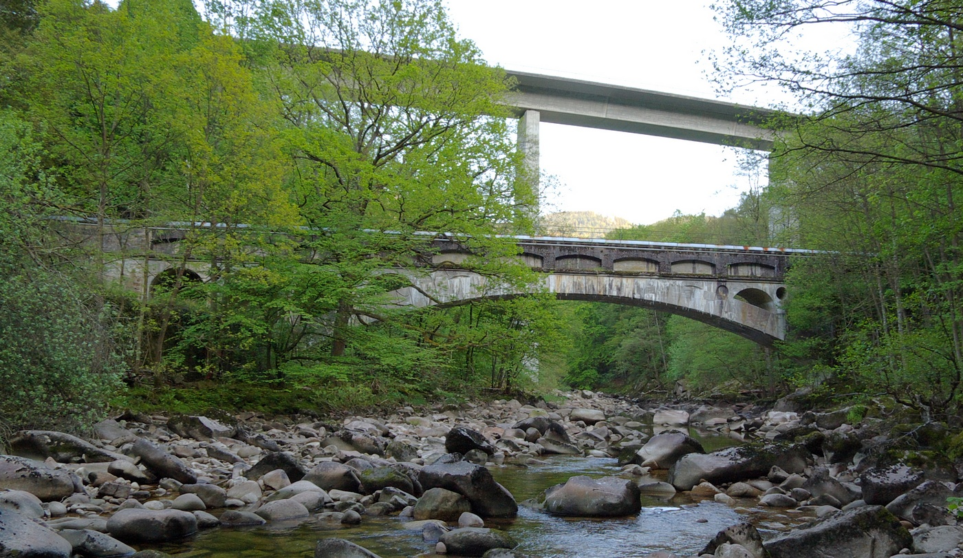 Aquädukt über die Murg zwischen Weisenbach und Forbach im Nordschwarzwald. Erste große Stampfbetonbrücke in Deutschland, errichtet 1885, Spannweite 40 Meter. Im Hintergrund eine Brücke der Bundesstraße 462.